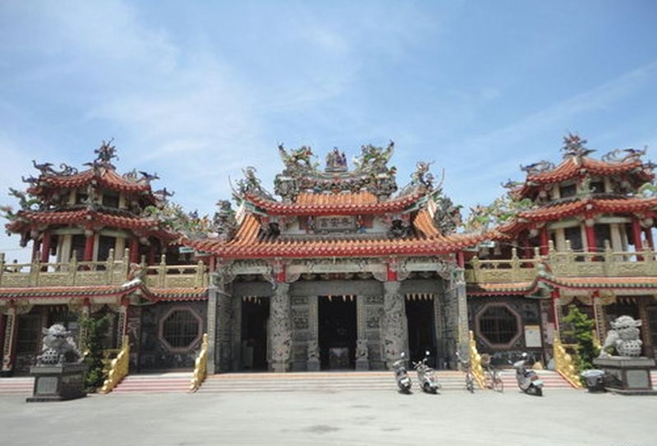 雲林縣褒忠鄉馬鳴村泰安5之1號－褒忠泰安宮。